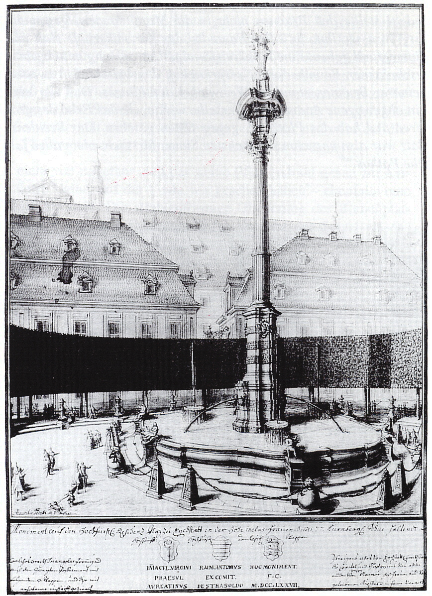 Der östliche Teil des Eichstätter Residenzplatzes mit der Mariensäule, 1777 eingeweiht. Stich von Maurizio Pedetti